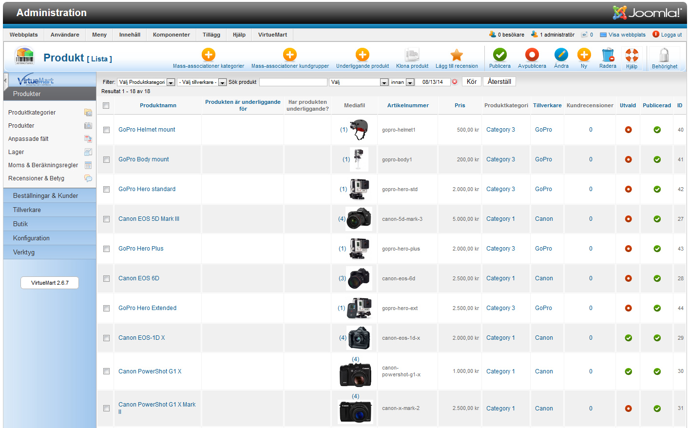 Virtuemarts administration